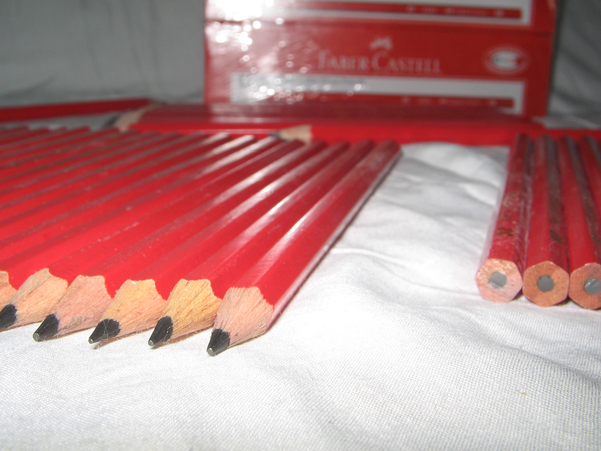 Pensil @ Mohamed Yosri 2005